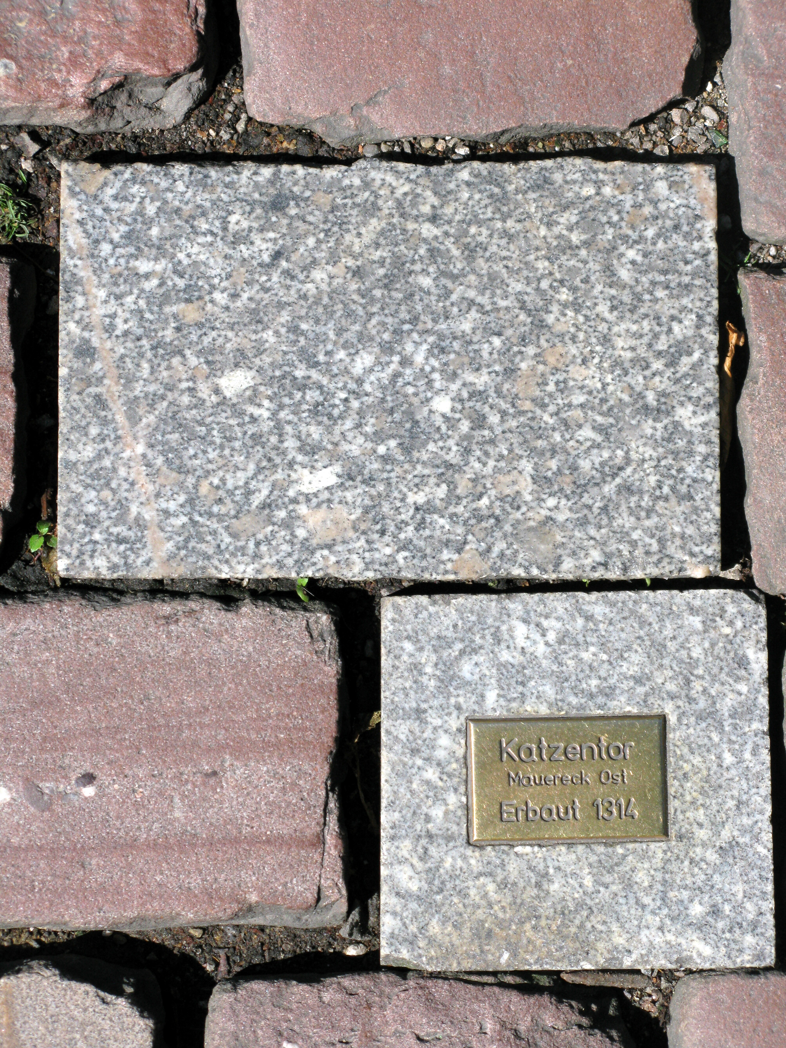 Markierung der Nordostecke des Katzenturmes (hier fälschlicherweise Katzentor) nähe Fußgängerüberweg